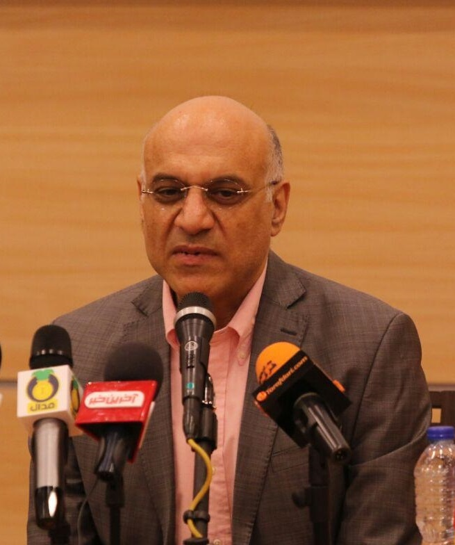 گزارش تصویری از مراسم معارفه و نشست خبری آندره‌آ استراماچونی در تیم استقلال